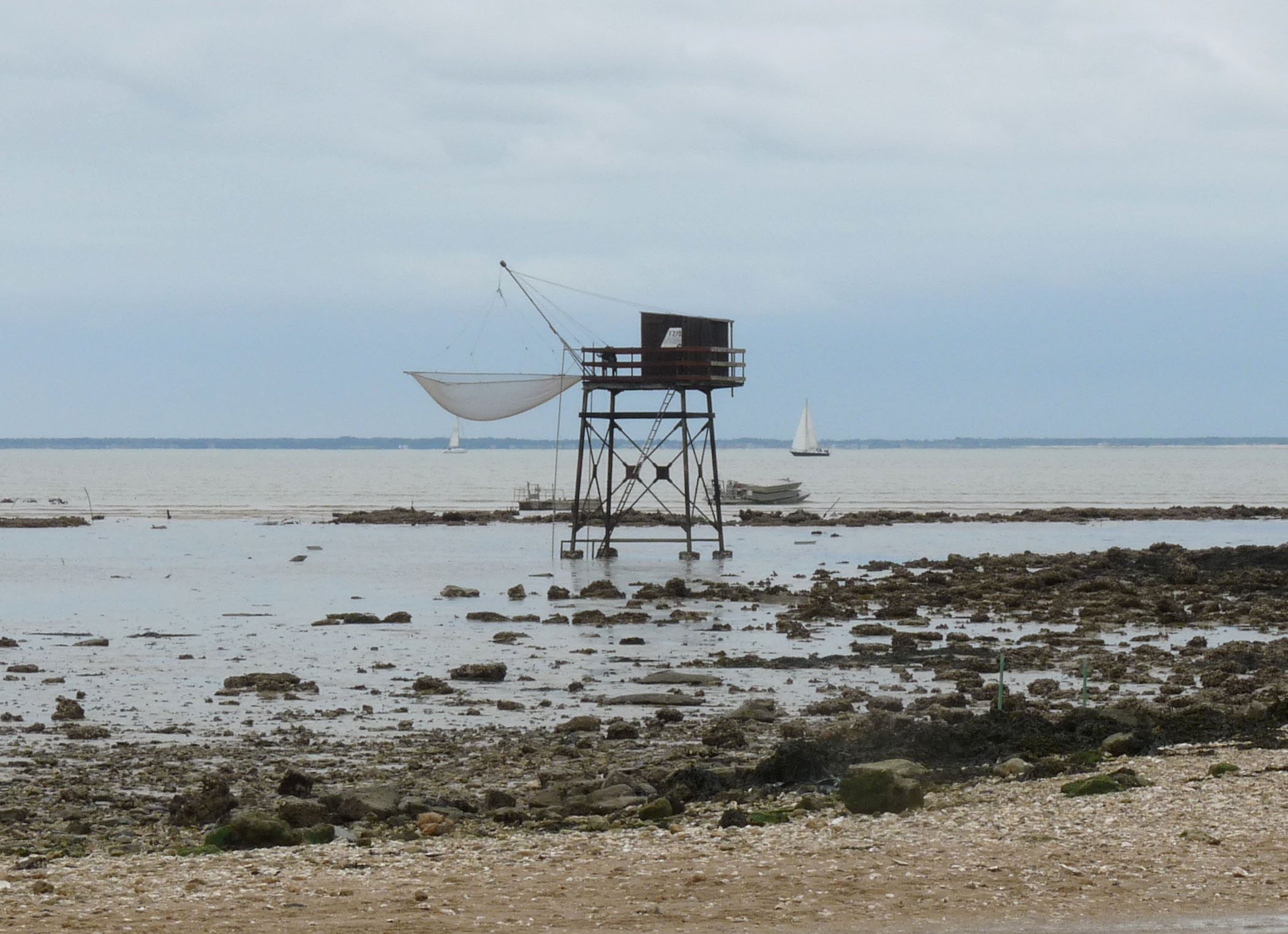 Carrelet à la Pointe de la Fumée (Charente-Maritime)